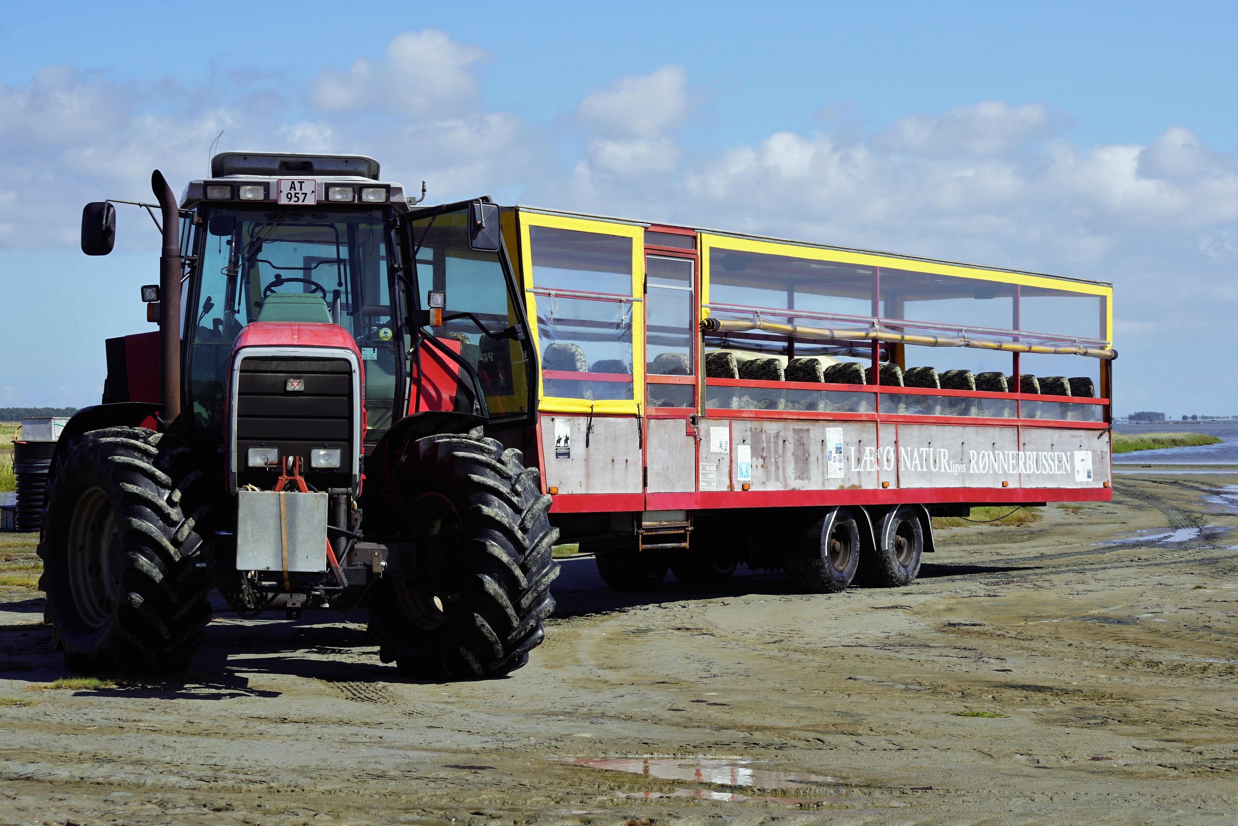 Rønnerbussen der kører turister ud på Rønnerne på Læsø